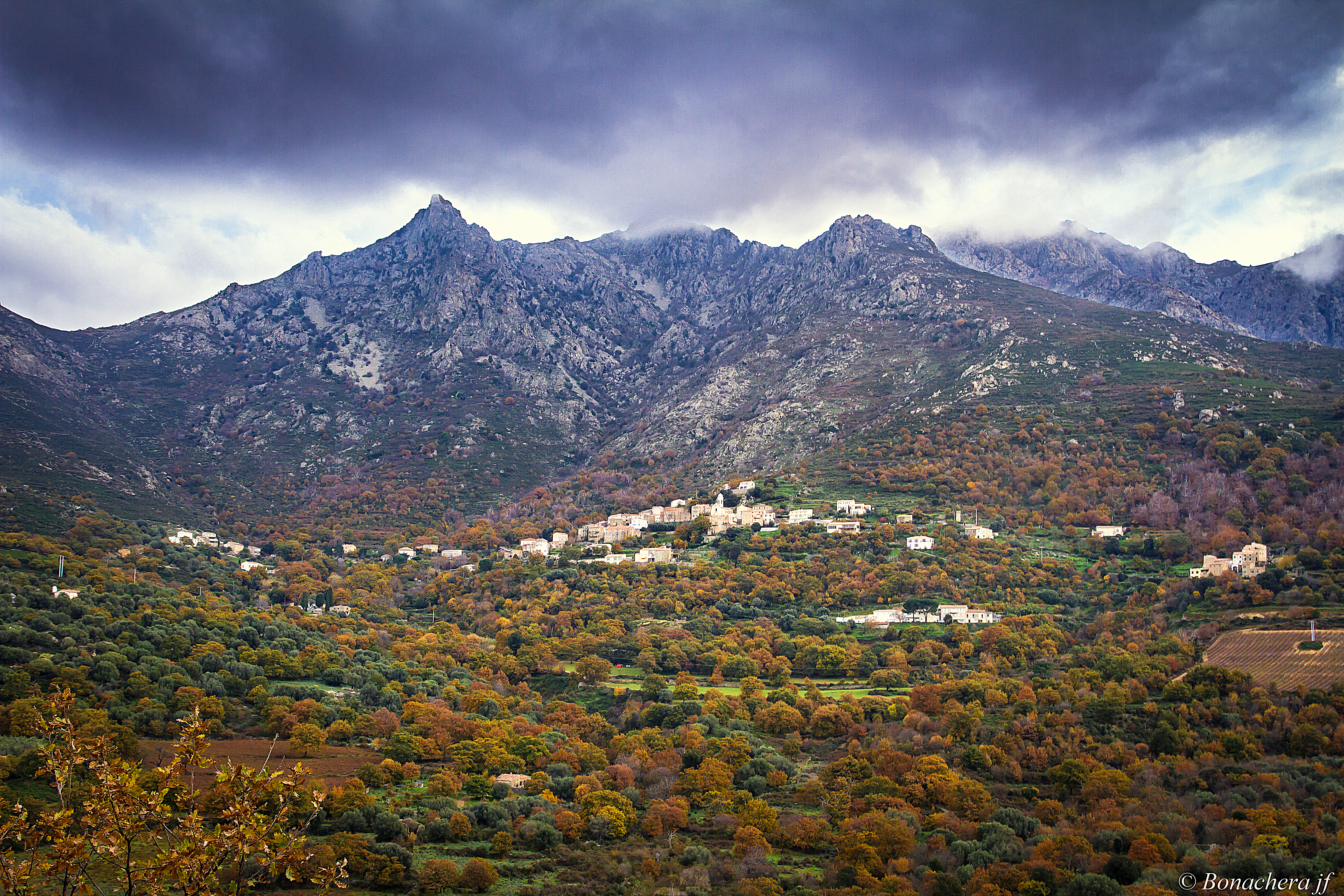 Le village de Nessa, vue depuis la D71